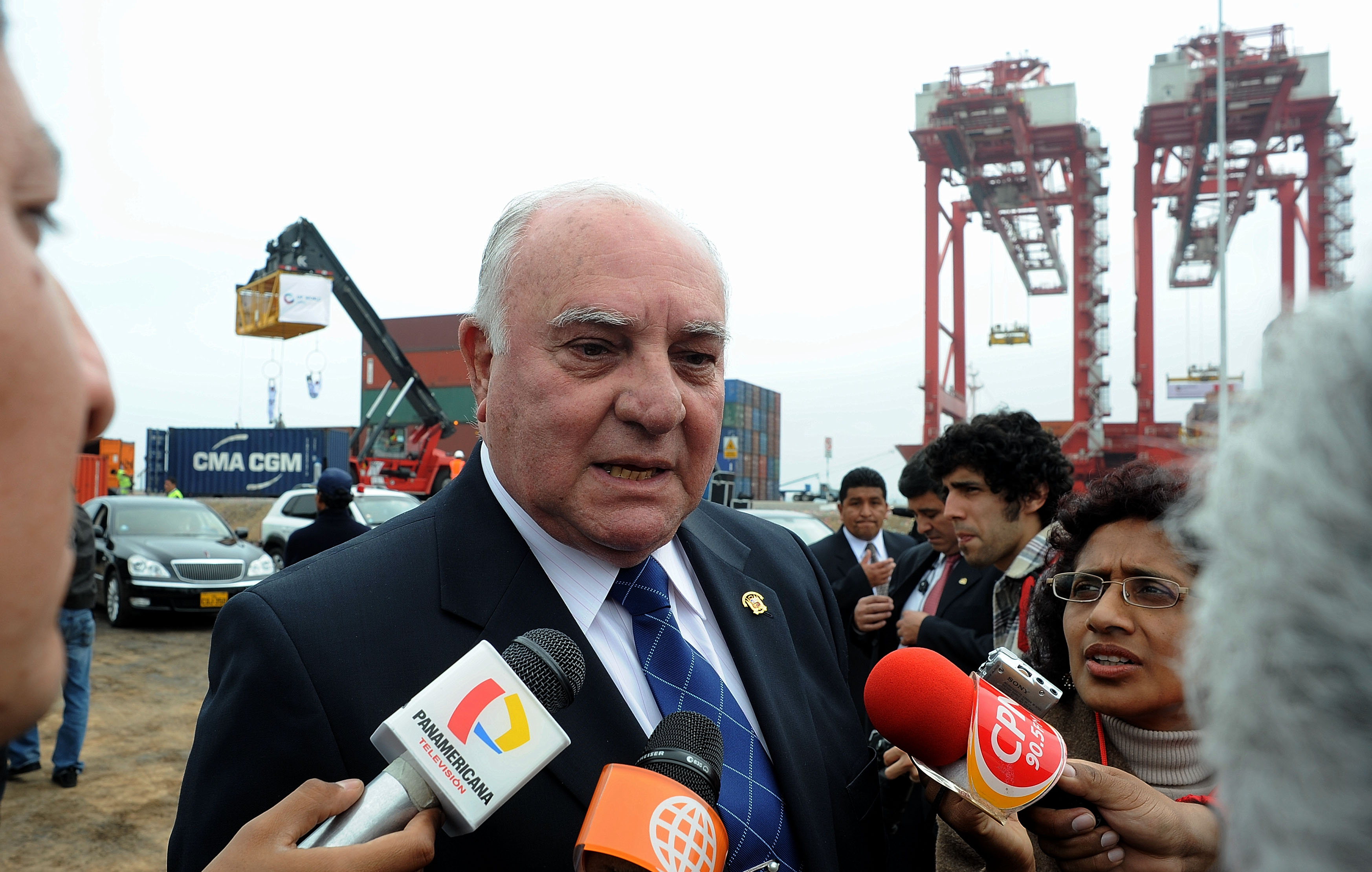 El congresista Luis Giampietri (PAP) participó en la ceremonia de inauguración del Terminal Portuario Muelle Sur y expresó su satisfacción por la importancia que adquiere el puerto del Callao con esta infraestructura.